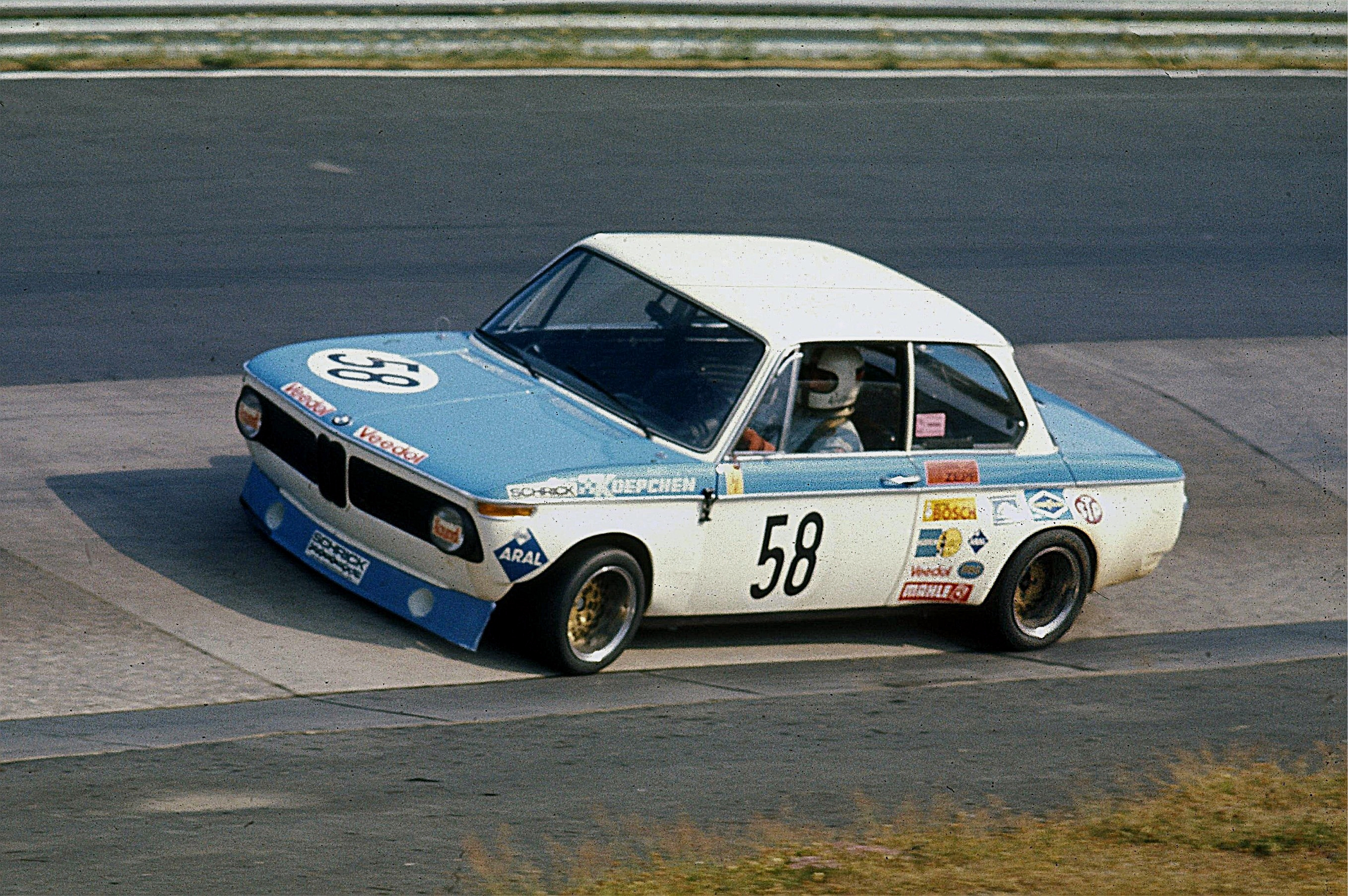 Bildbeschreibung: Helmut Kelleners im Koepchen-BMW 2002, Training zum 6-Stunden-Rennen Fotograf: Lothar Spurzem Datum: 06.07.1973 beim Training zum GP der Tourenwagen auf dem Nürburgring Sonstiges: Streckenabschnitt Karussell